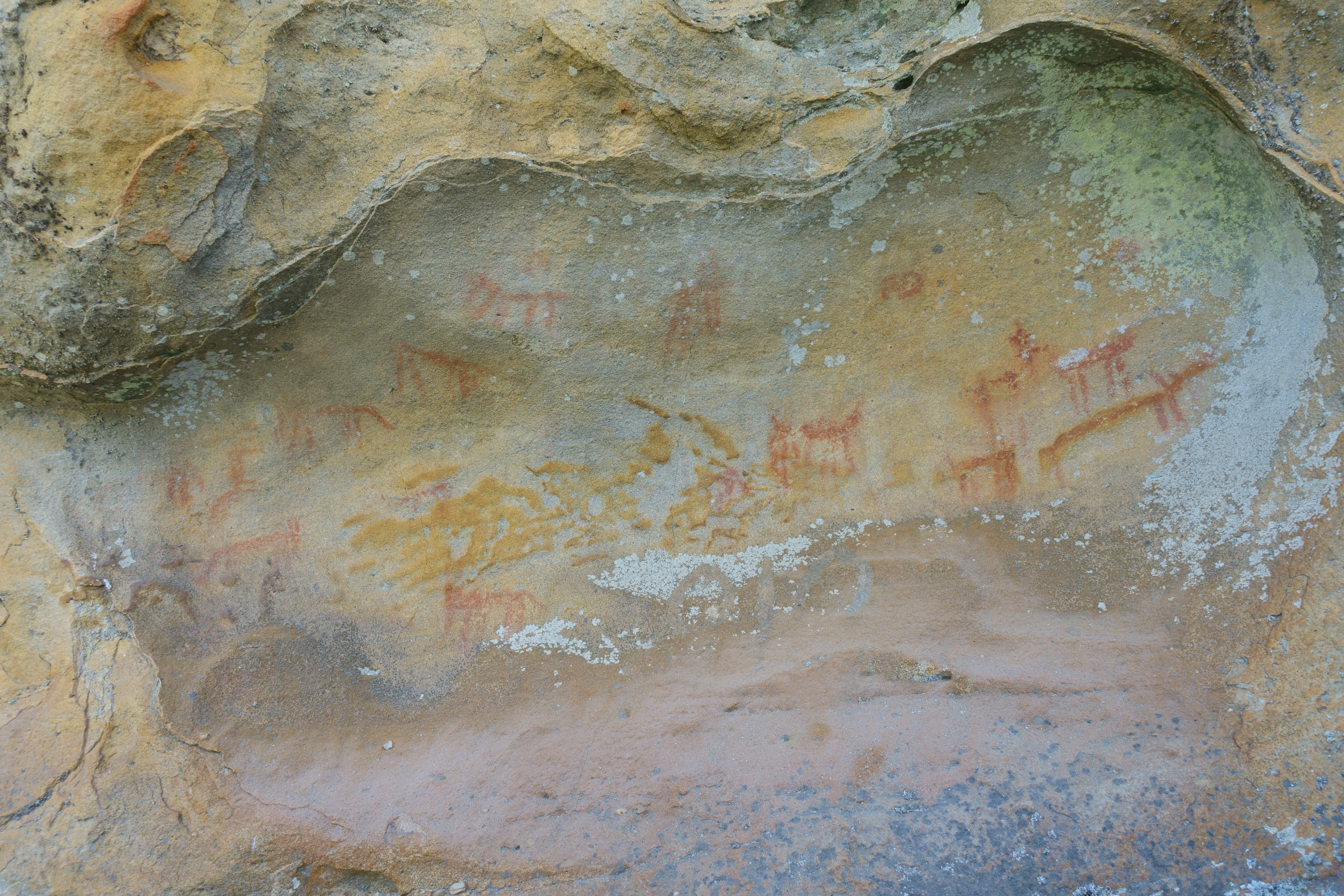 Estación rupestre de Peña Somera, en el monte Valonsadero (Soria, España).